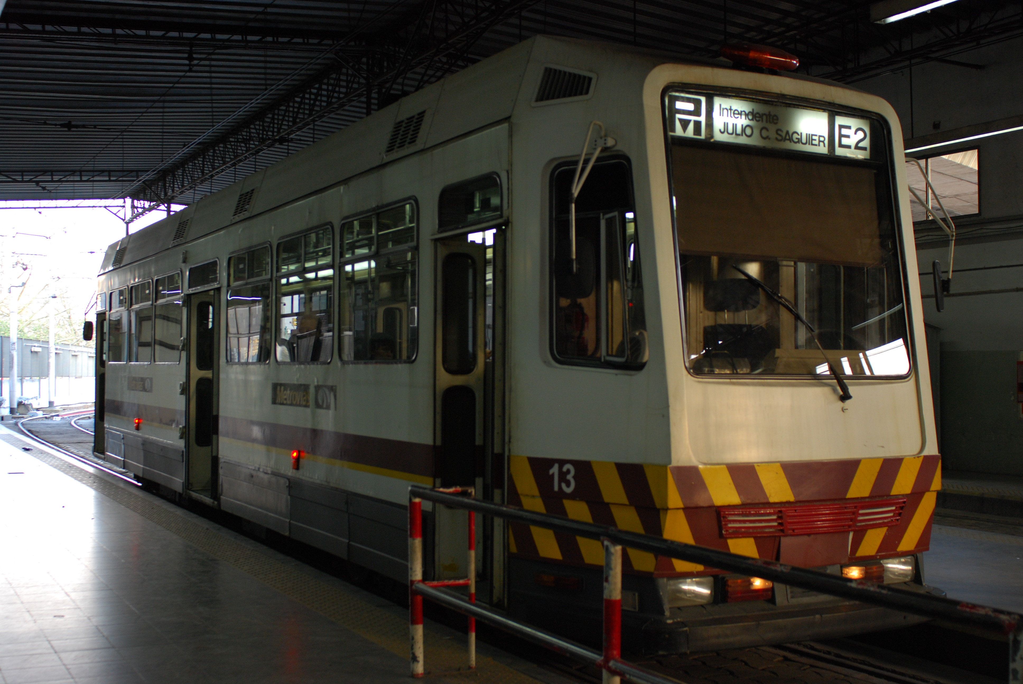 Vagón del premetro en estación terminal Intendente Saguier, Buenos Aires, Argentina (septiembre 2008)